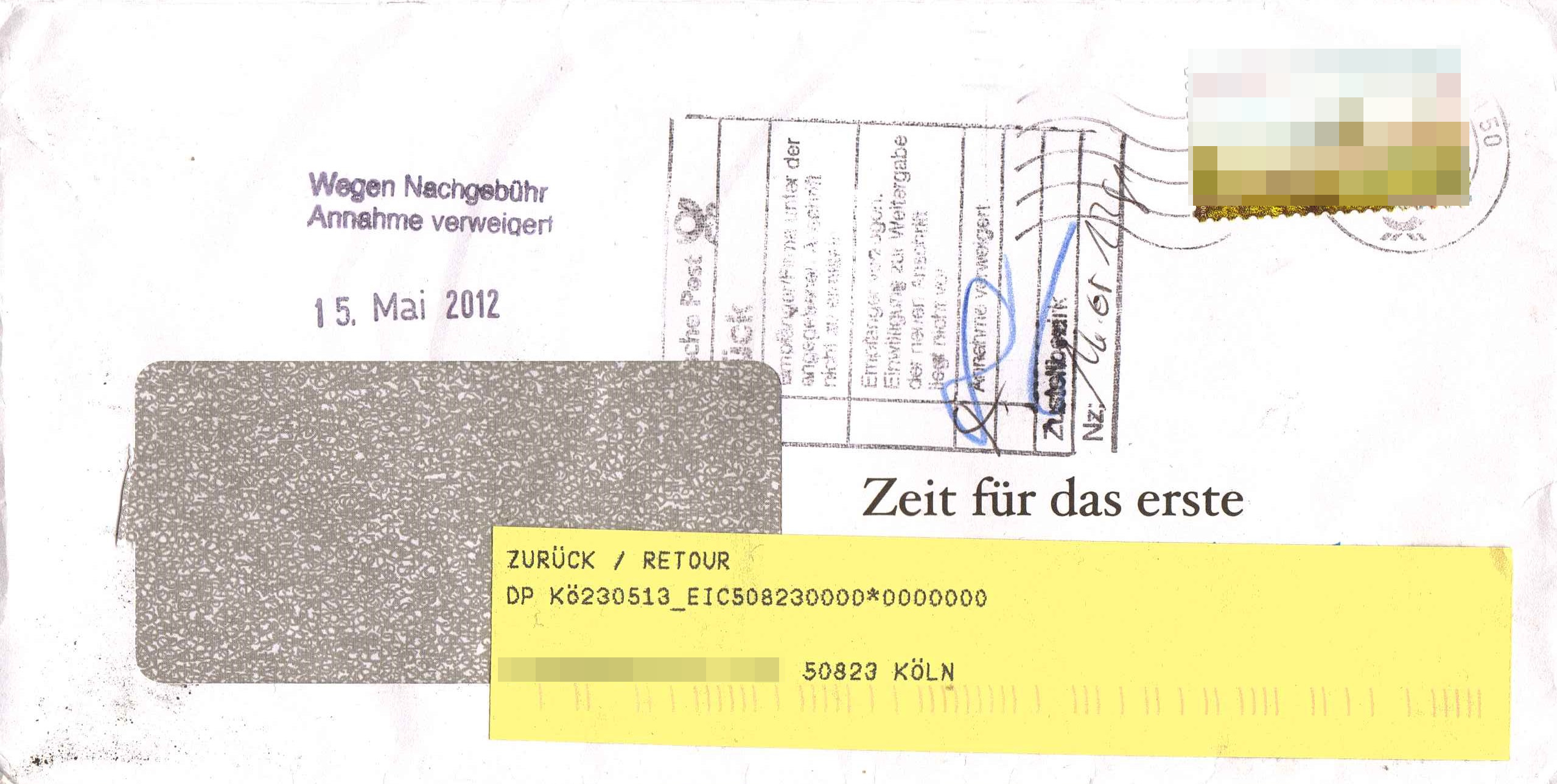 Briefumschlag, innerdeutsch durch die Deutsche Post transport. Rücksendung an den Absender, da wegen Nachgebühr der Empfänger die Annahme verweigert hat. Die Briefmarke wurde aus urheberrechtlichen Gründen verpixelt.